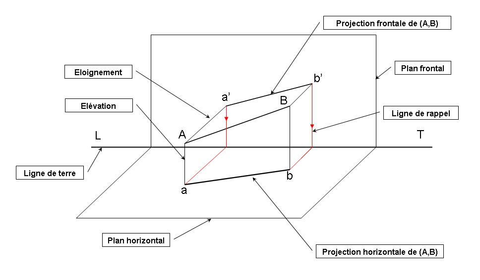 Représentation d'une droite quelconque suivant les vues horizontale et frontale.